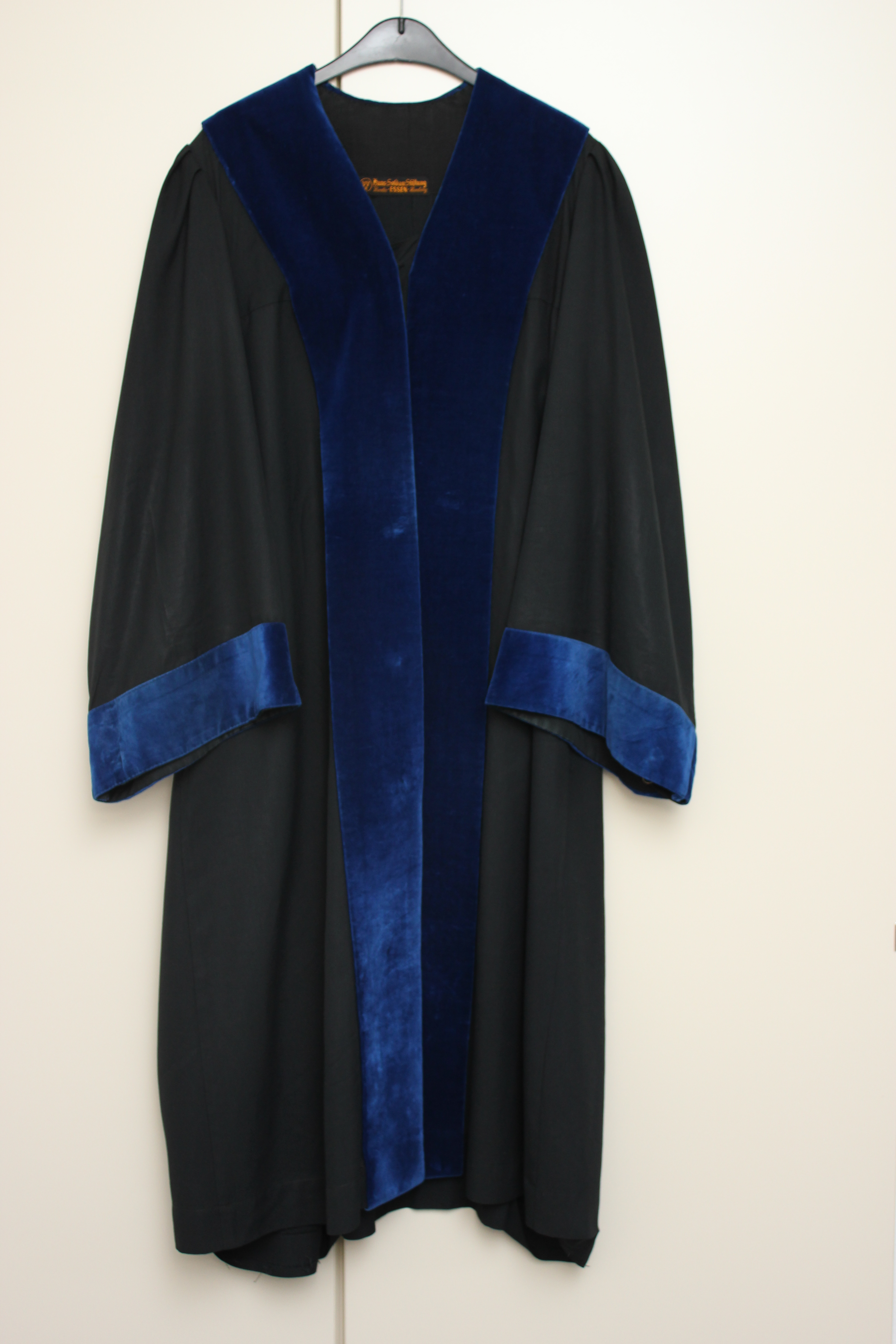 Das Bundespatentgericht in München. Fotografiert im Rahmen des Landtagsprojektes Bayern 2012. Wikipedia im Landtag – Bayern 17. bis 19. Juli 2012 in München Dieses Foto wurde im Rahmen des Projektes „Wikipedia im Landtag“ erstellt.